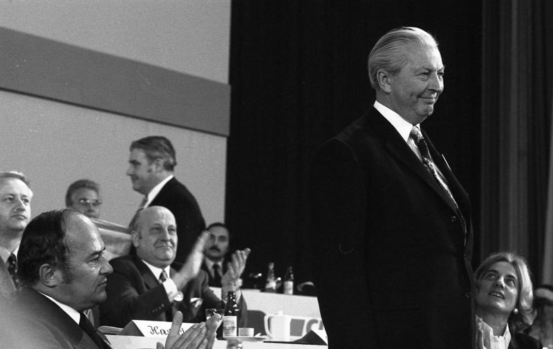 CDU-Parteitag 1972 in der Wiesbadener Rhein-Main-Halle 9.-11.10.1972